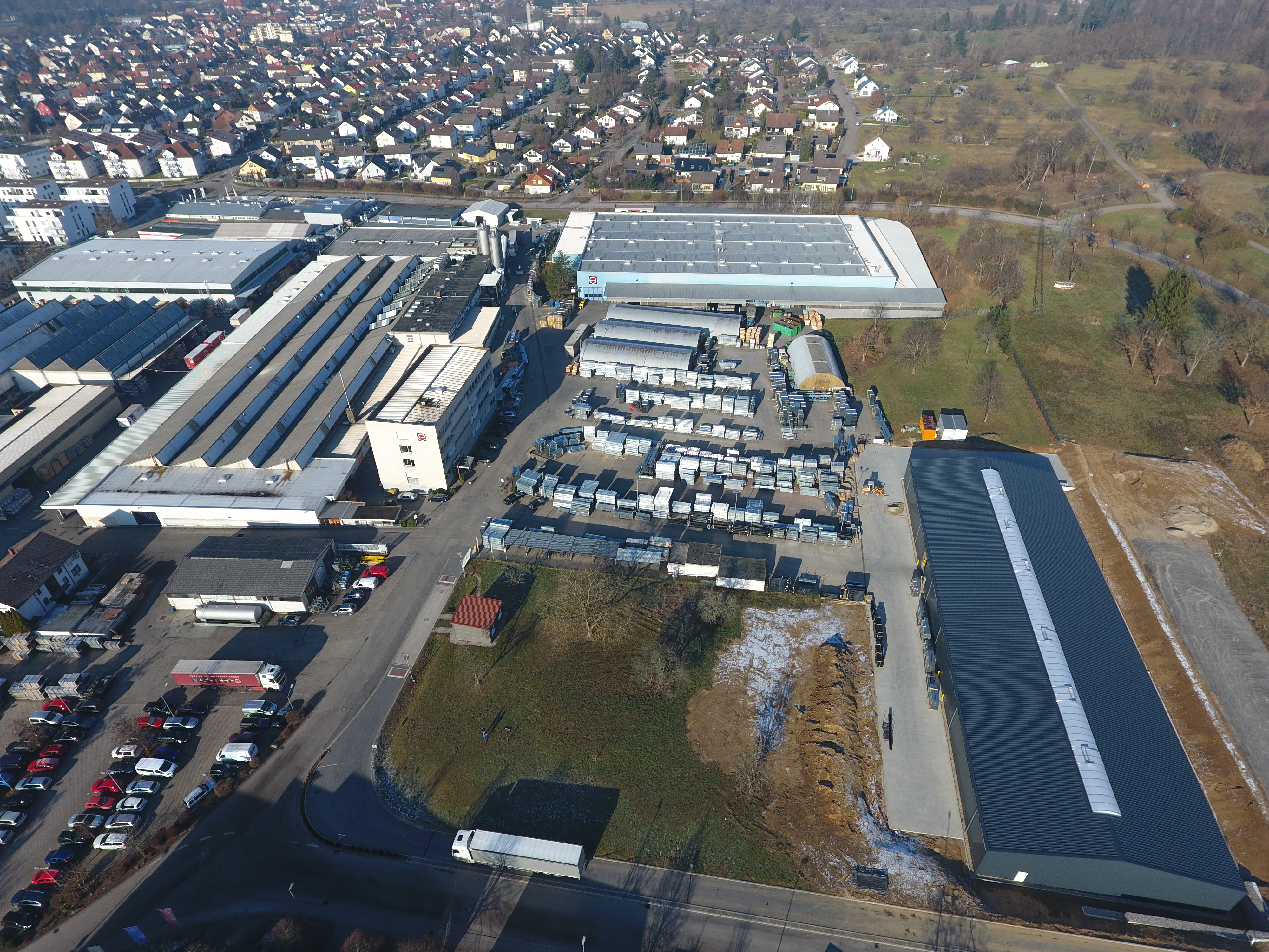 Firmengelände des Hauptsitzes der Protektorwerk Florenz Maisch Gmbh in Gaggenau. Dahinter zum angrenzenden Gaggenauer Stadtteil Bad Rotenfels zählende Wohngebiete.